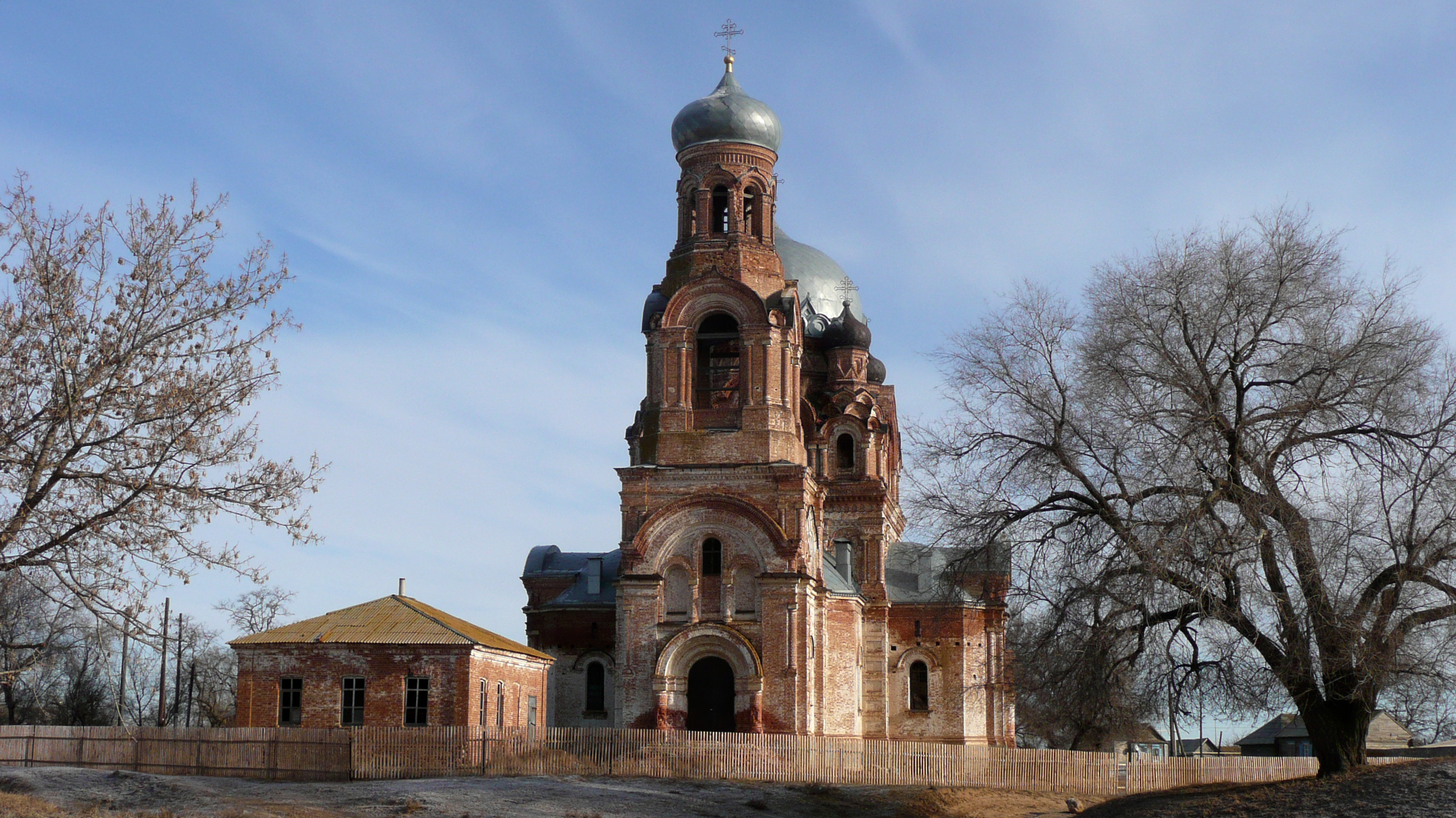 Церковь Покрова Пресвятой Богородицы в селении Пришиб.